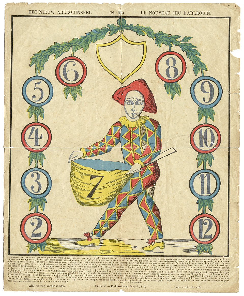 Papier van spel Zevenzot. Eigen scan. Uitgever Brepols (Turnhout, België) liet mij het volgende weten: Het op de site van de Open Encyclopedie afgebeelde exemplaar is een herdruk van na 1911. Op dit document rust geen copyright.